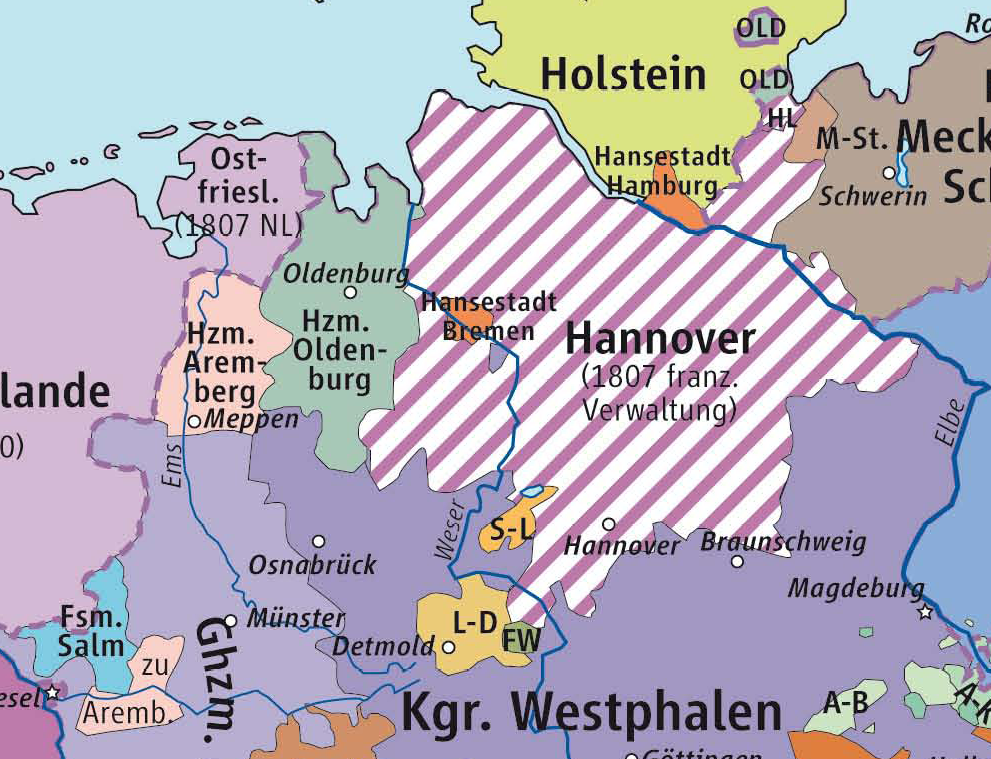 Karte des Kurfürstentum Hannover 1807 im Rheinbund